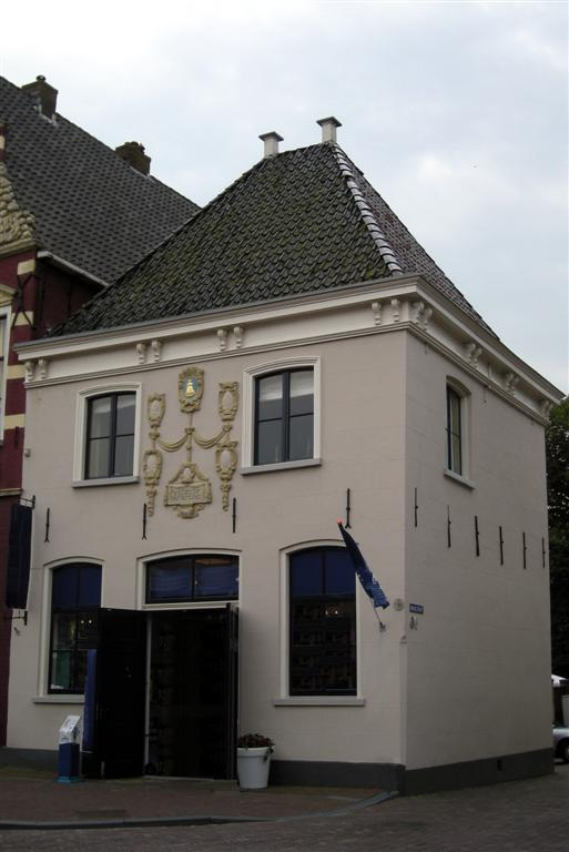 Waag in Franeker